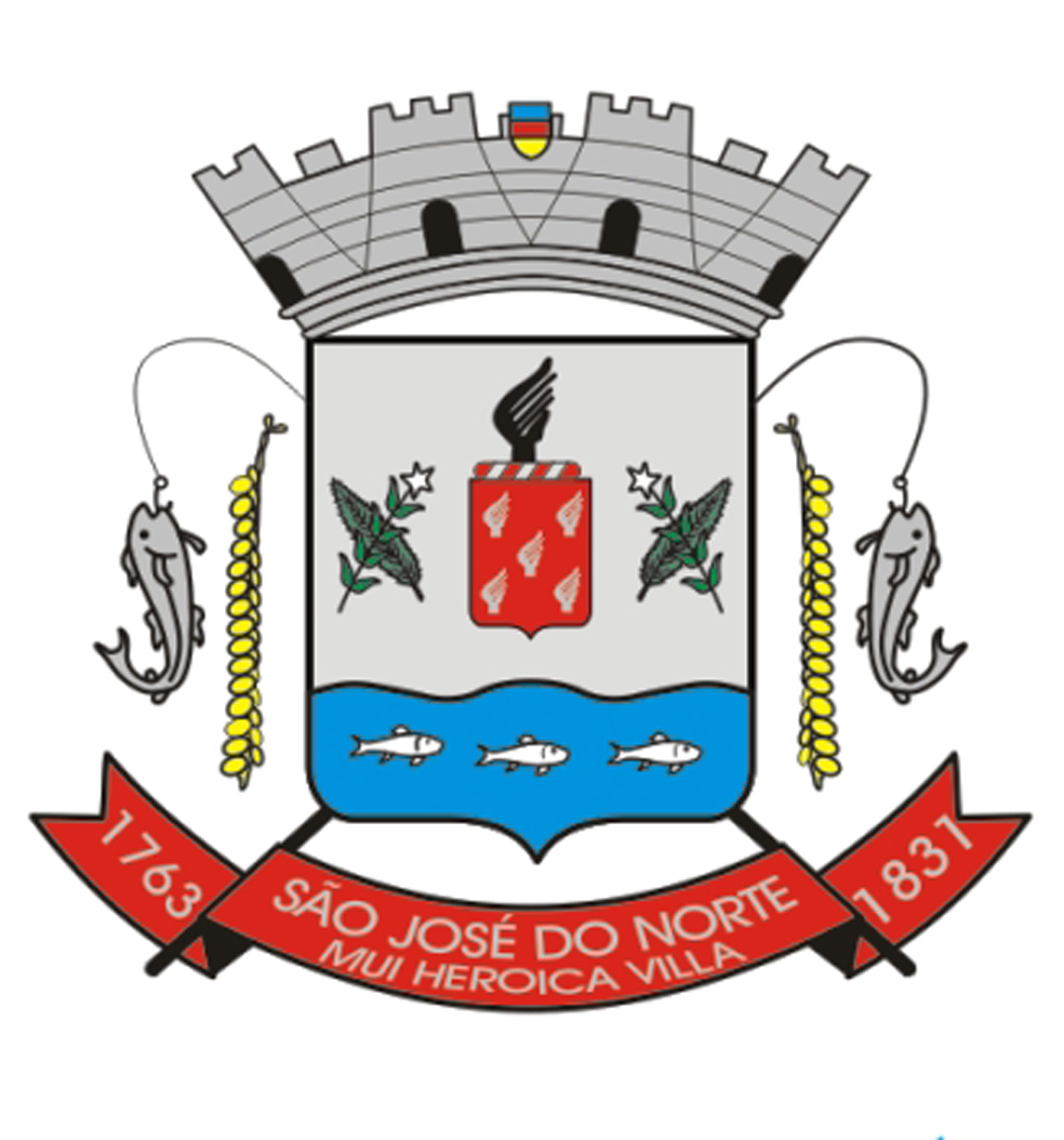 Coat of arms of São José do Norte, Rio Grande do Sul, Brazil.